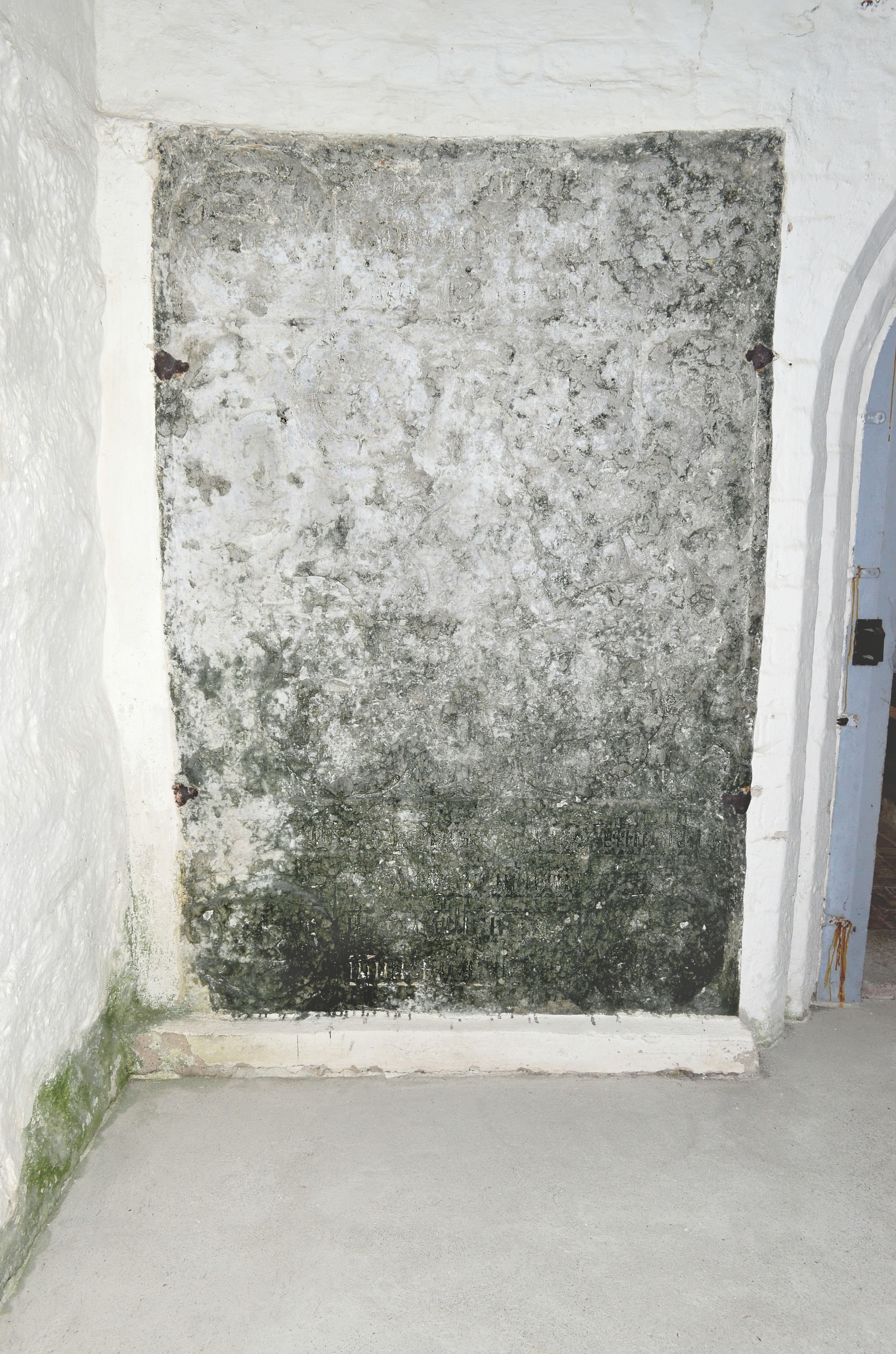 Damshagen, St. Thomas- Kirche Grabstein 1555 wahrscheinlich Bernt von Pless- Berend von Plessen- 2